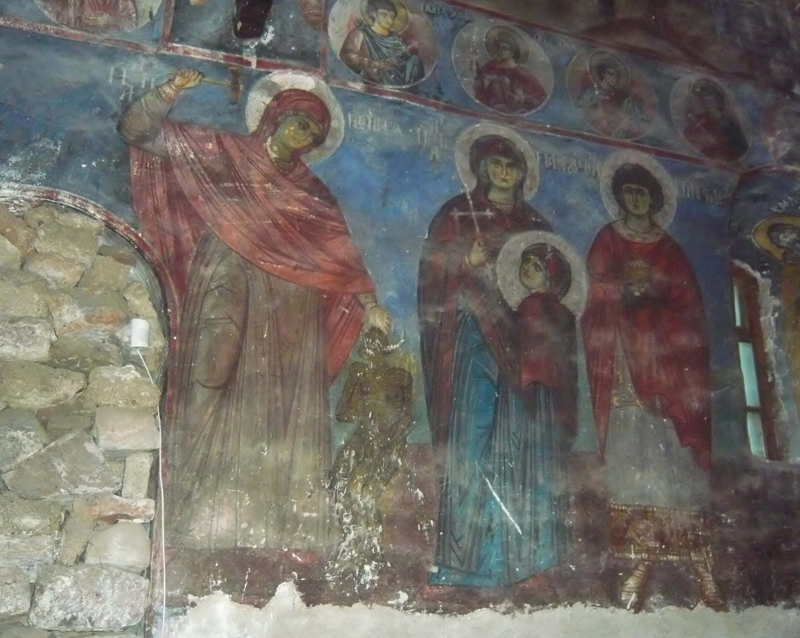 Kościół Świętego Mikołaja w Voskopojë. Freski w świątyni. 1726 r.